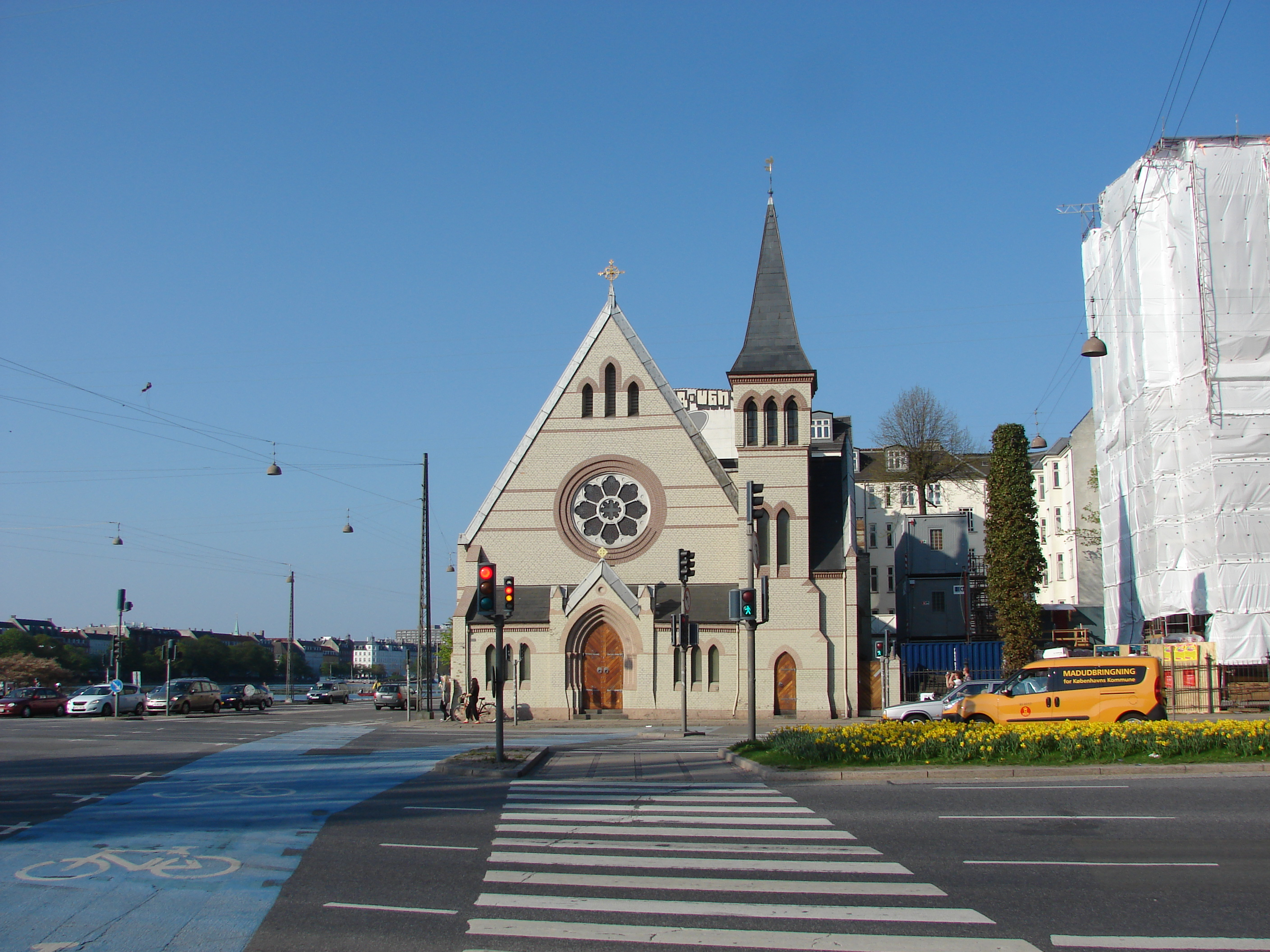 Den Katolsk Apostoliske Kirke, Gyldenløvesgade 20, hjørnet af Nørre Søgade, København